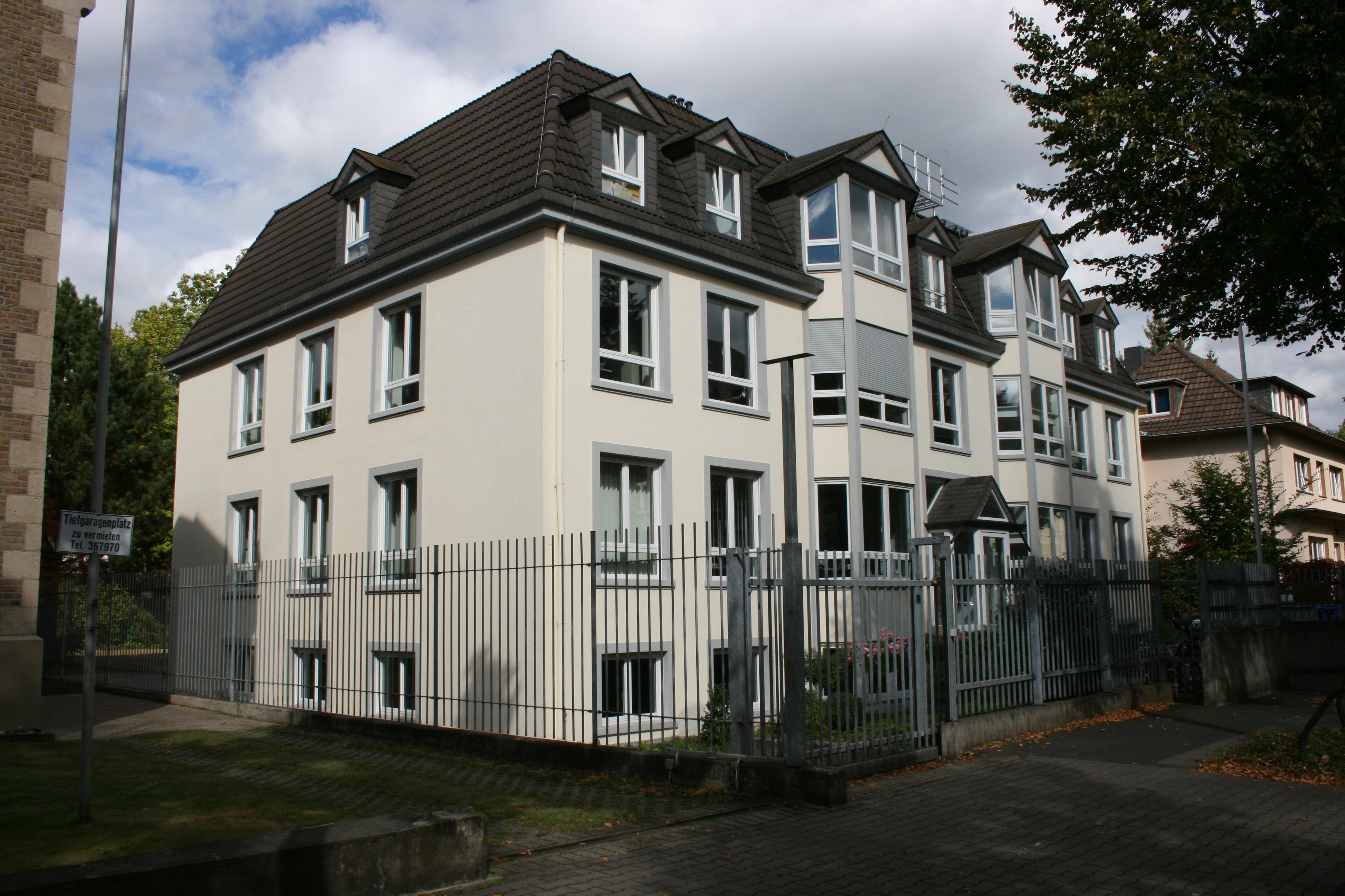 Sitz der Kommission für Archäologie Außereuropäischer Kulturen (KAAK) des Deutschen Archäologischen Instituts (DAI) in Bonn-Bad Godesberg, Dürenstr. 35–37